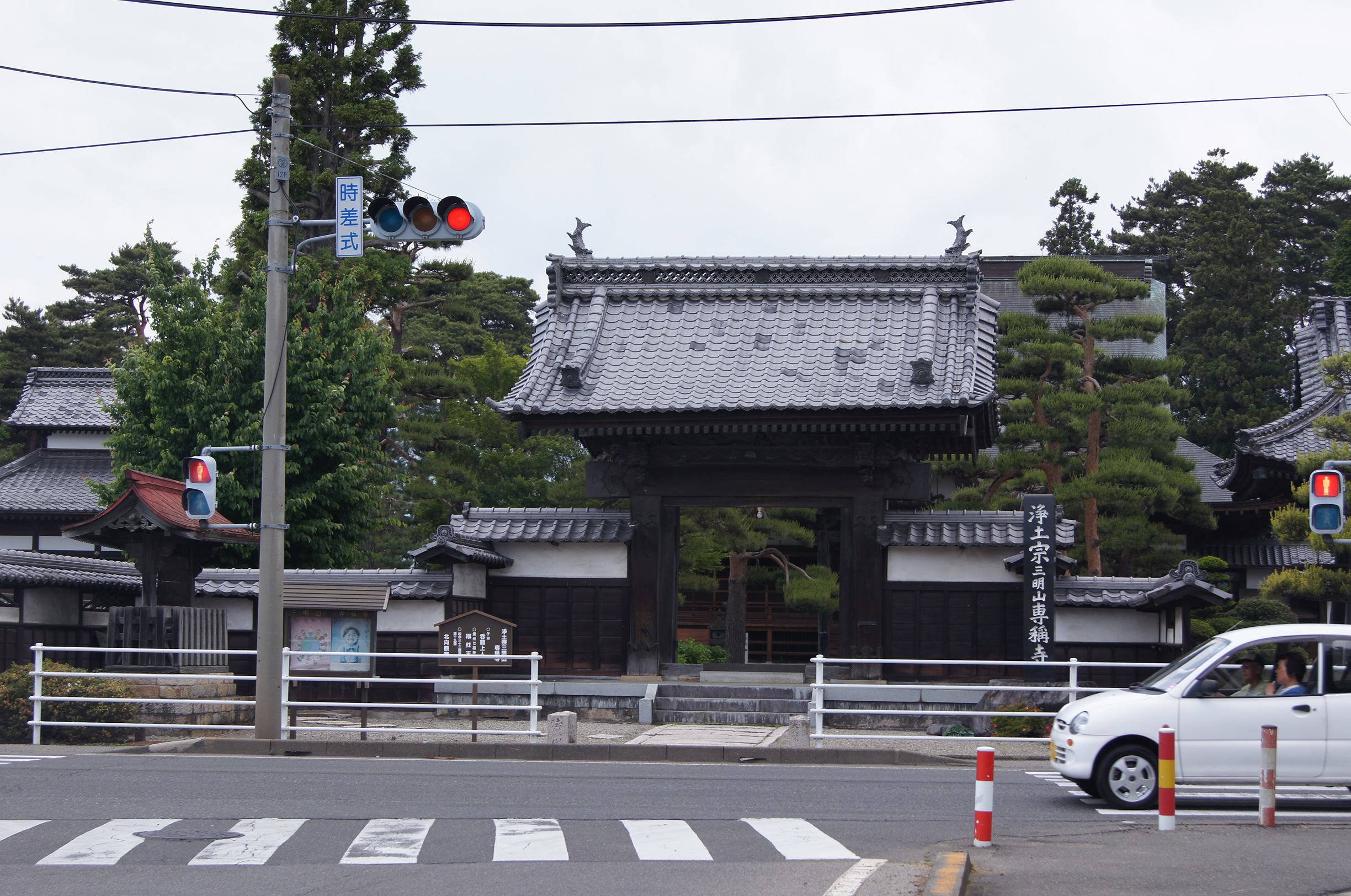 長野県松本市新村の新村駅近くにある浄土宗の寺